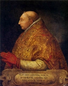 Pisanello, copia da Ritratto di Martino V (Galleria Colonna)